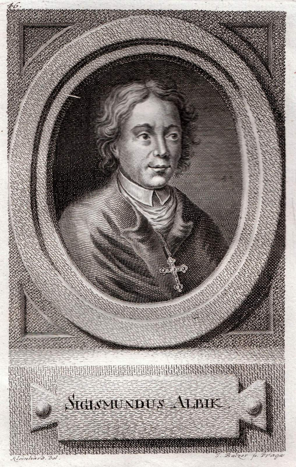 Albík z Uničova (1360—1427)